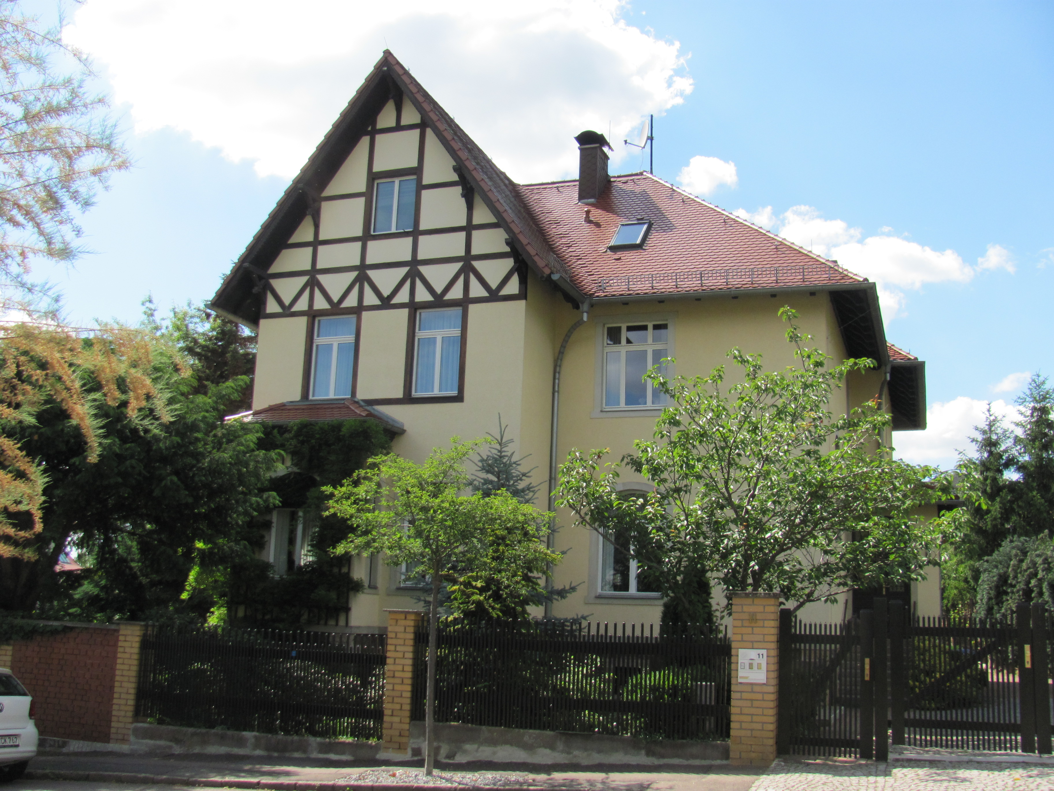 Fehlende Kulturdenkmale nach Wikipedialiste in Heinrich-Heine-Straße, Horst-Vieth-Straße, Humboldtstraße, Dr-Rudolf-Friedrichstraße